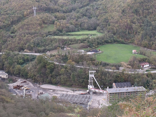 Pozo Monsacro en la actualidad